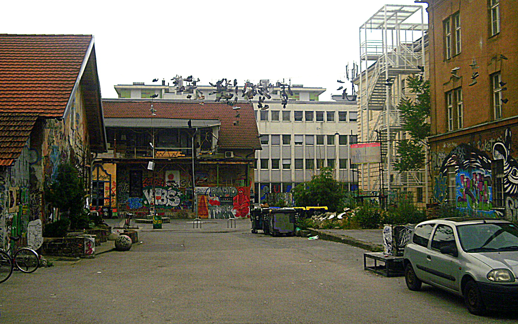 Salah satu sudut kota Metelkova pada tahun 2013